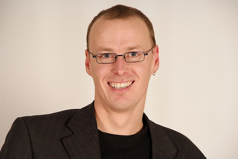 Ralf Briese, Landtagsabgeordneter Niedersachsen, 16. Wahlperiode (Fotoprojekt Landtagsabgeordnete Niedersachsen am 24. und 25. November 2009)